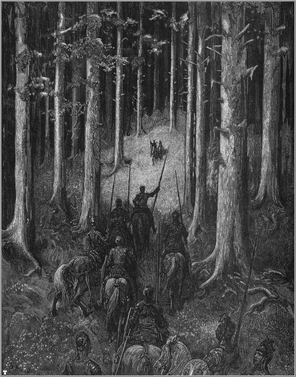 illustration of Ludovico Ariosto’s “Orlando Furioso”.